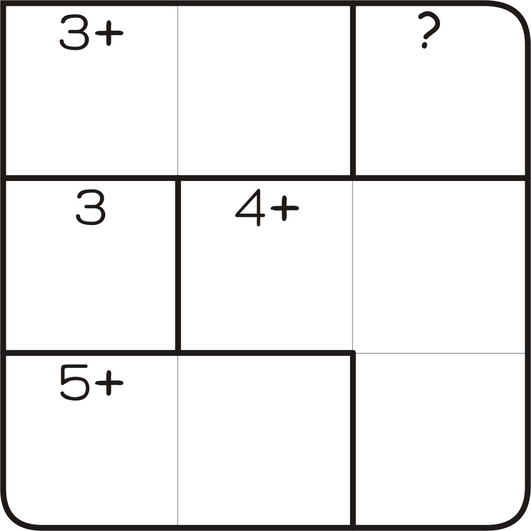 KENDOKU Sample